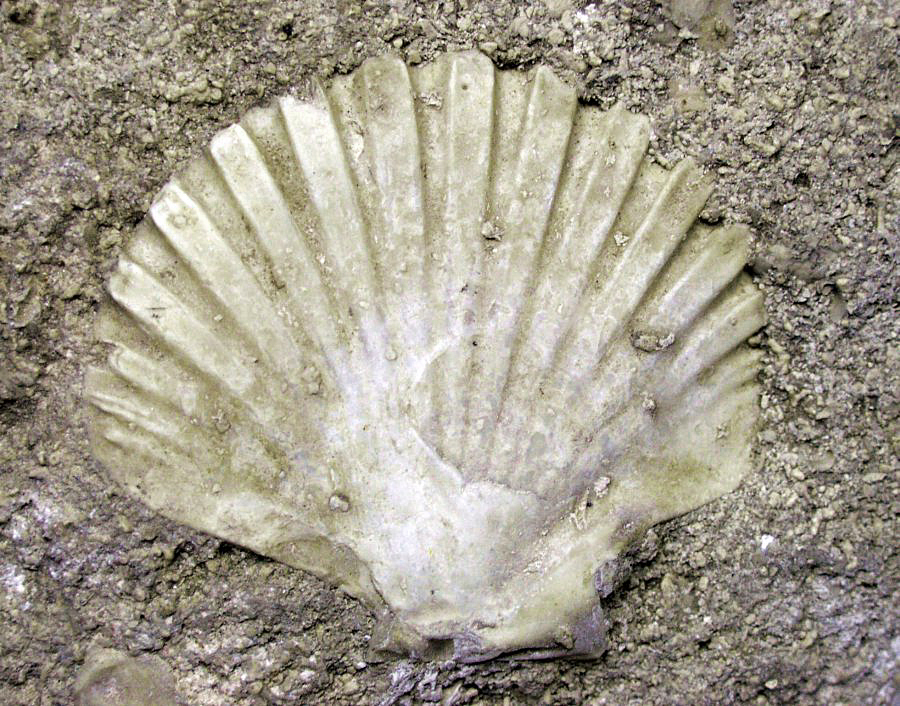 Fésűkagyló a fertőrákosi kőfejtő lajtamészkövébe ágyazódva